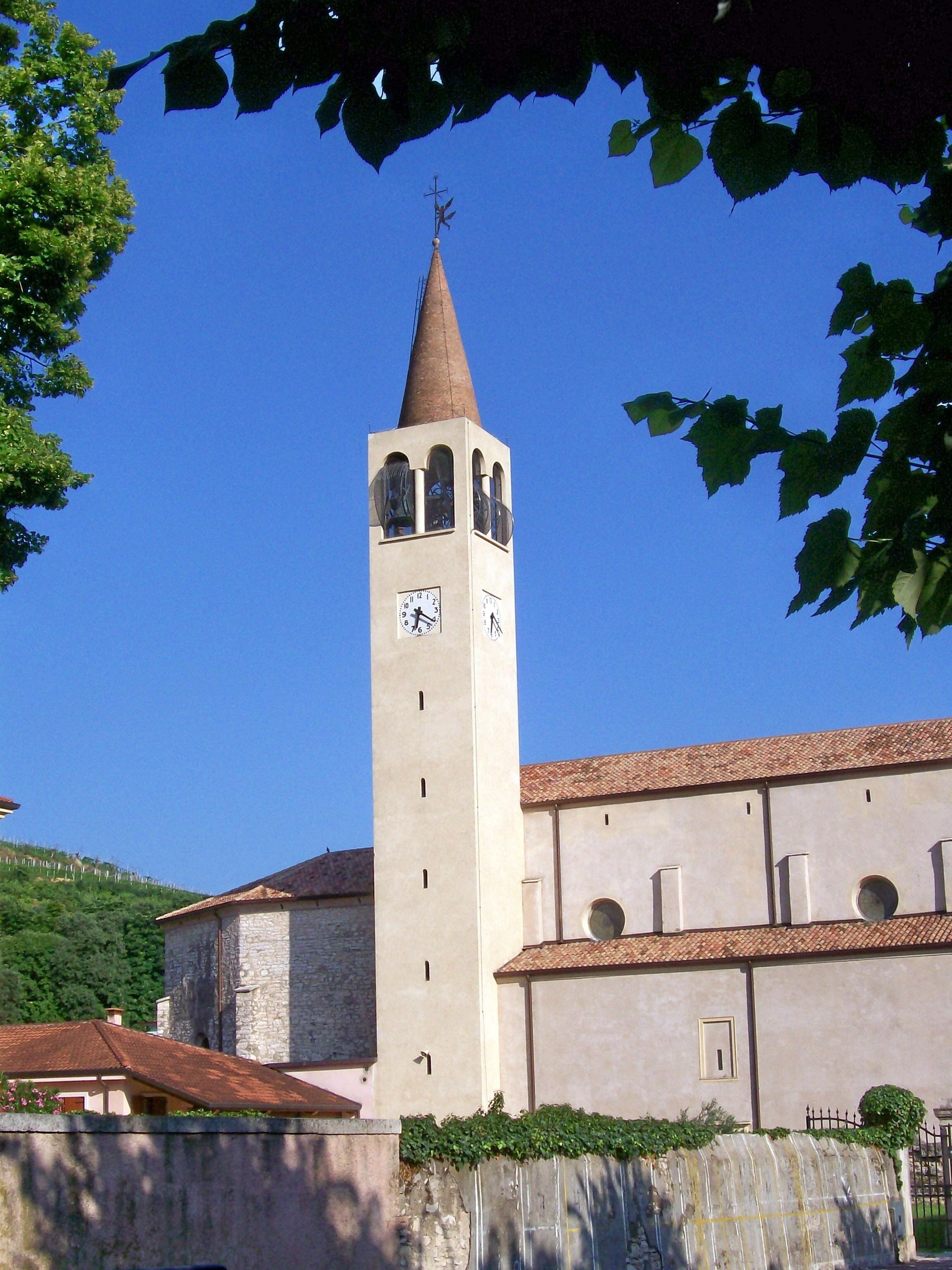 Campanile della chiesa parrocchiale di S. Giorgio Martire in Cazzano di Tramigna (dopo i lavori di ristrutturazione del 2008).